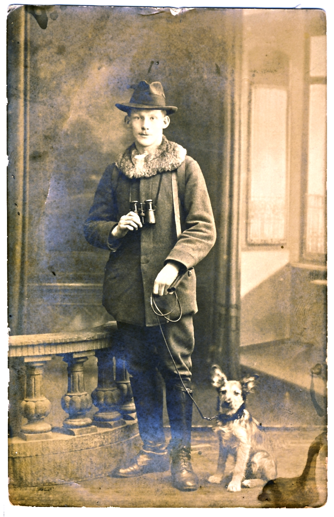 Hinsche Max Jugendbild